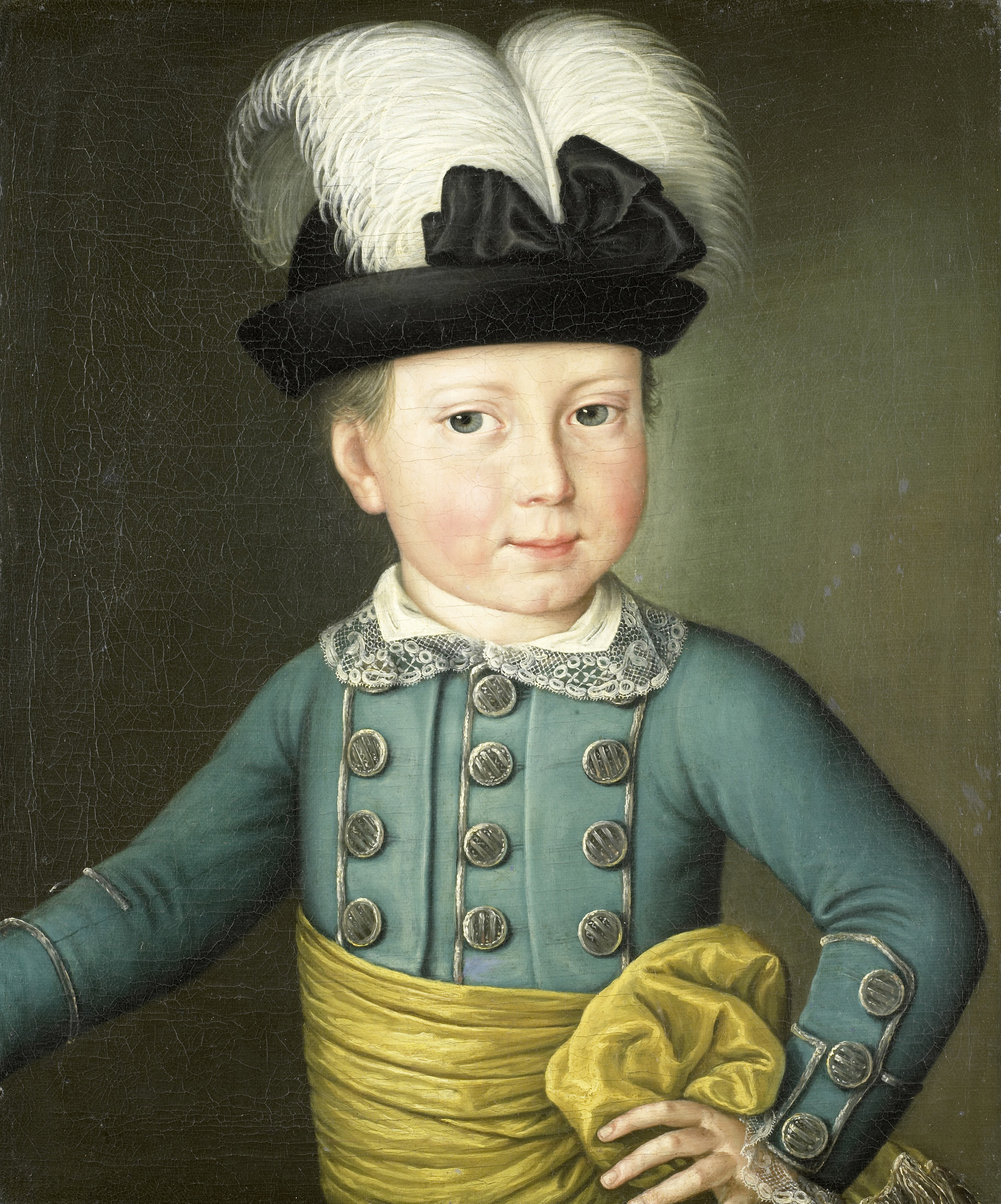 Portret van Willem Frederik (1772-1843), prins van Oranje-Nassau (later koning Willem I), als kind. Ten halven lijve, aanziend, de linkerhand in de zij. Op het hoofd een hoed met pluim. Pendant van SK-A-1477.